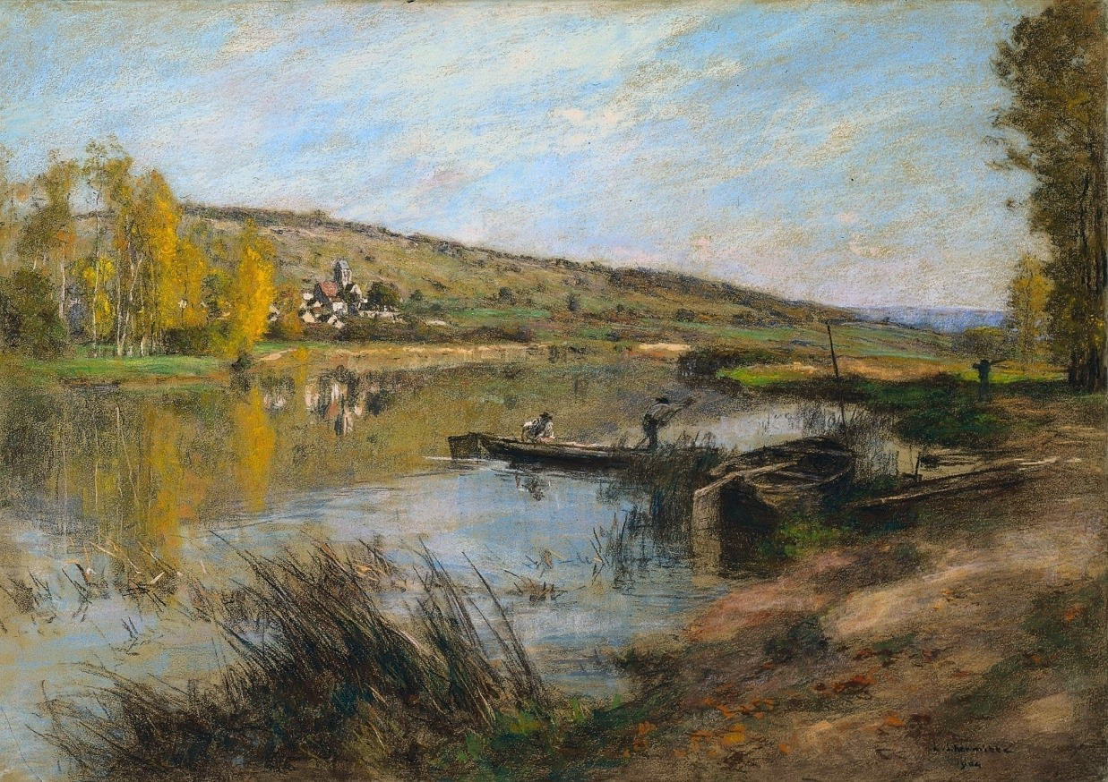 Tableau de Léon Augustin Lhermitte, peint en 1904. Il est exposé au musé de Cleveland (Ohaio, USA)